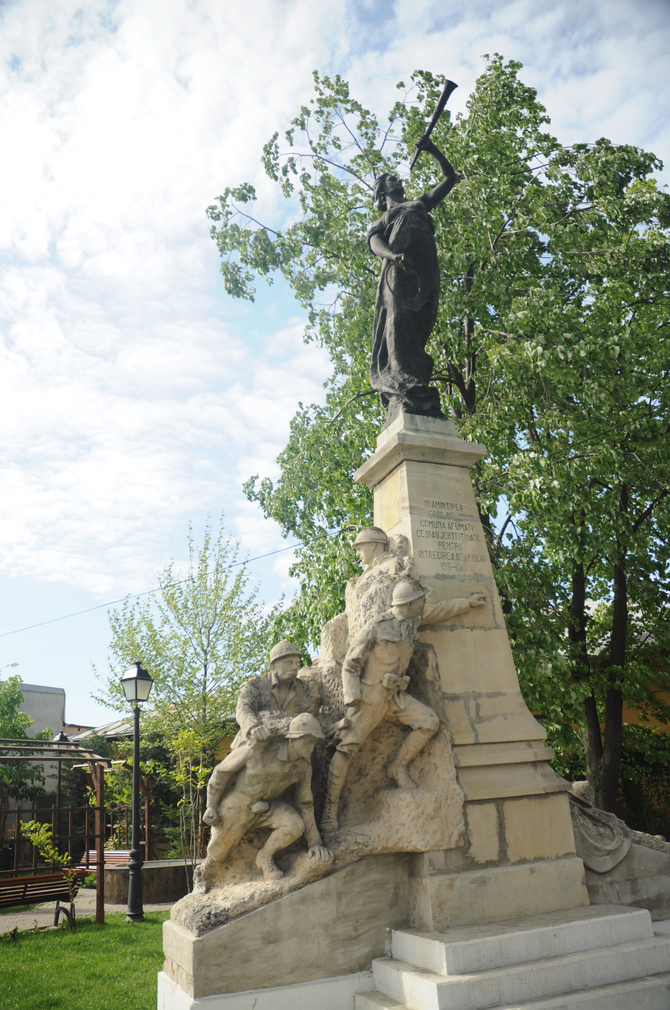 Monumentul Eroilor căzuți în primul război mondial